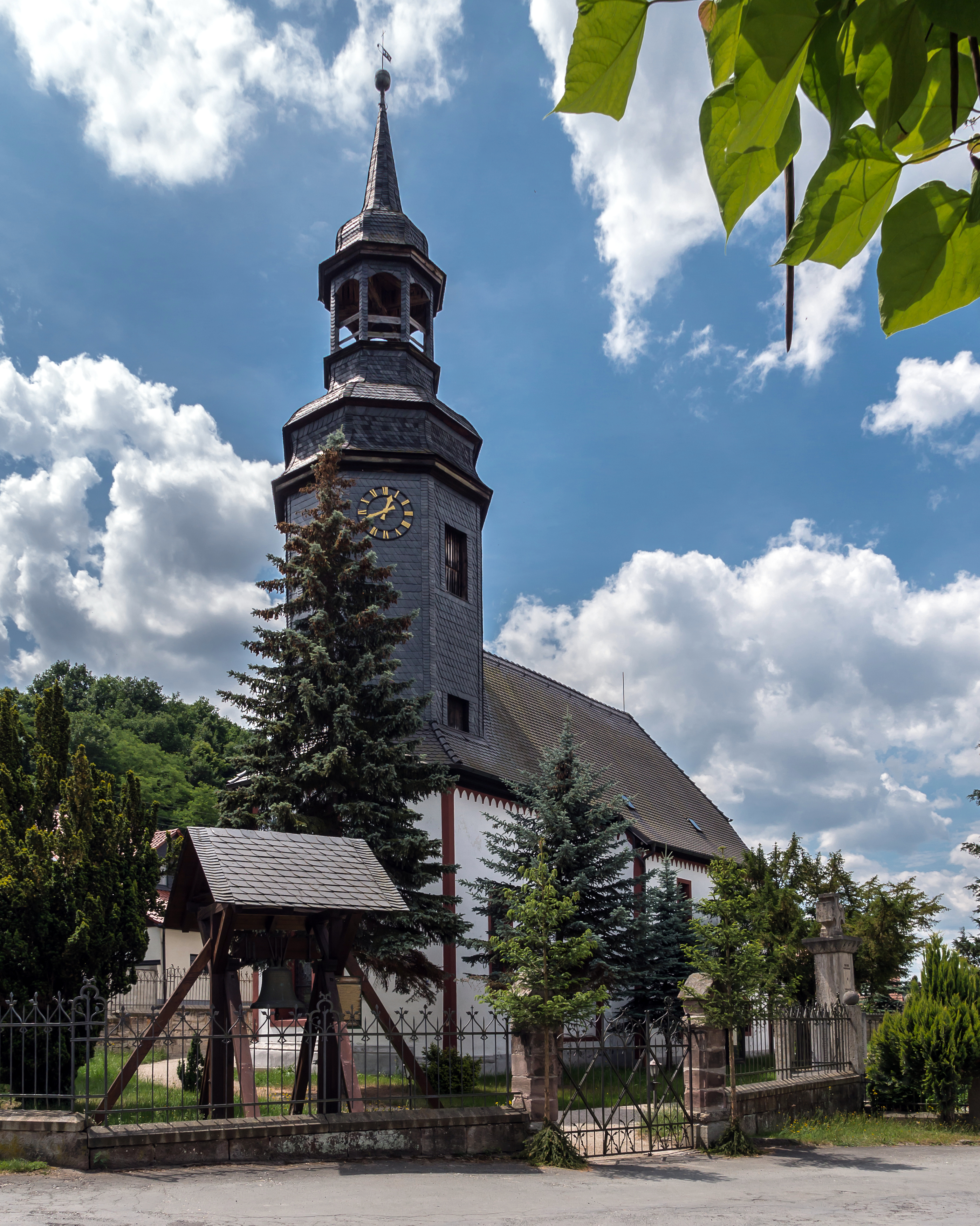 Kulturdenkmal in Uhlstädt-Kirchhasel,Gemeinde Niederkrossen,Kirche mit Ausstattung